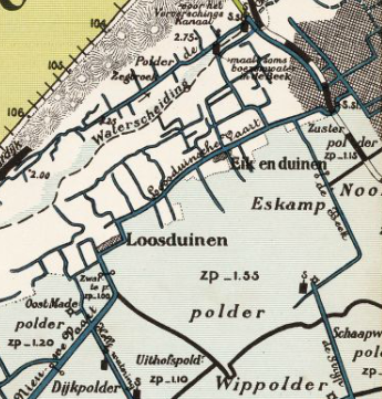 Eskamppolder